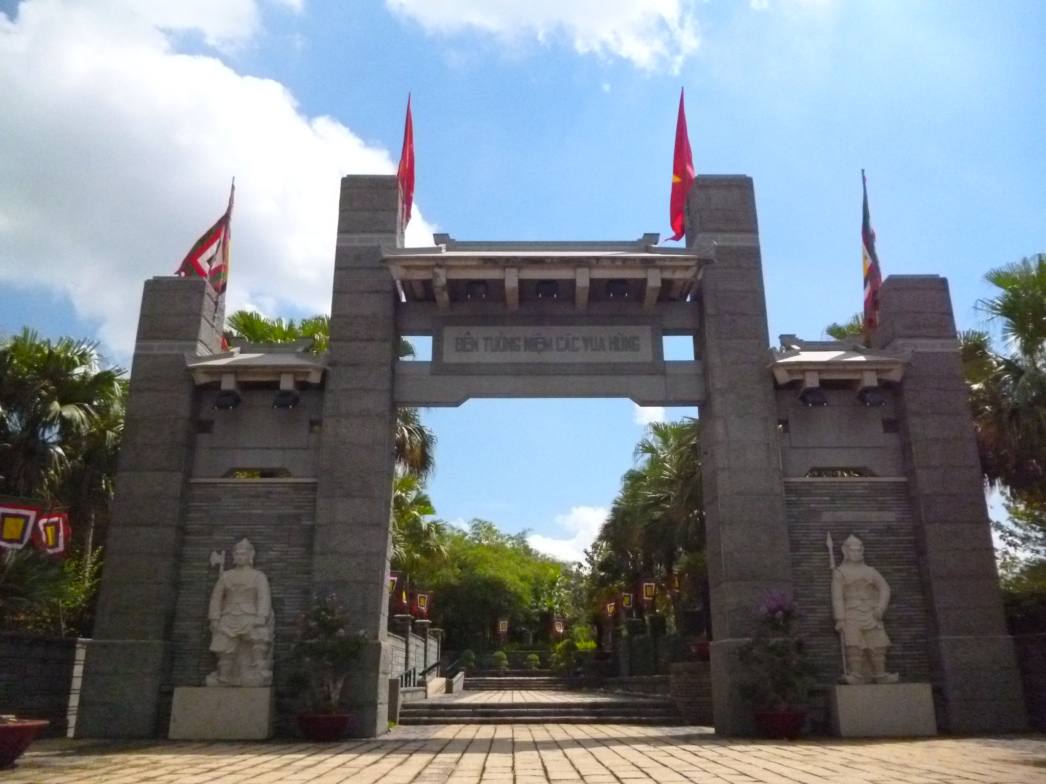 Hình chụp bằng máy ảnh cá nhân về Công viên Văn hóa lịch sử dân tộc tại Quận 9